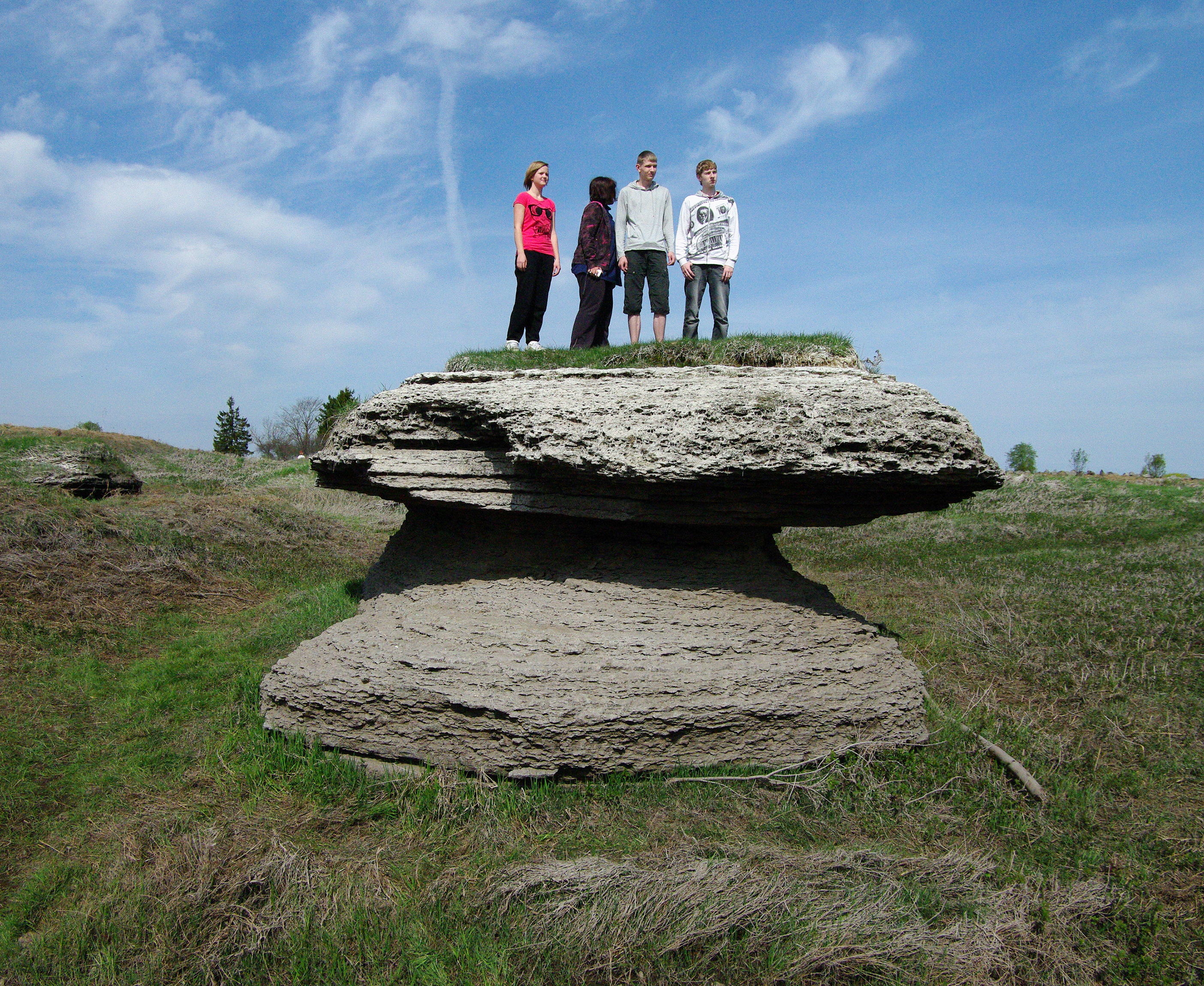 Kostivere karstiala, kiviseen